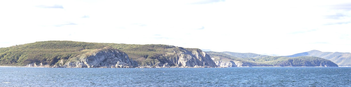 панорама полуострова Рудановского - вид с залива Владимир.